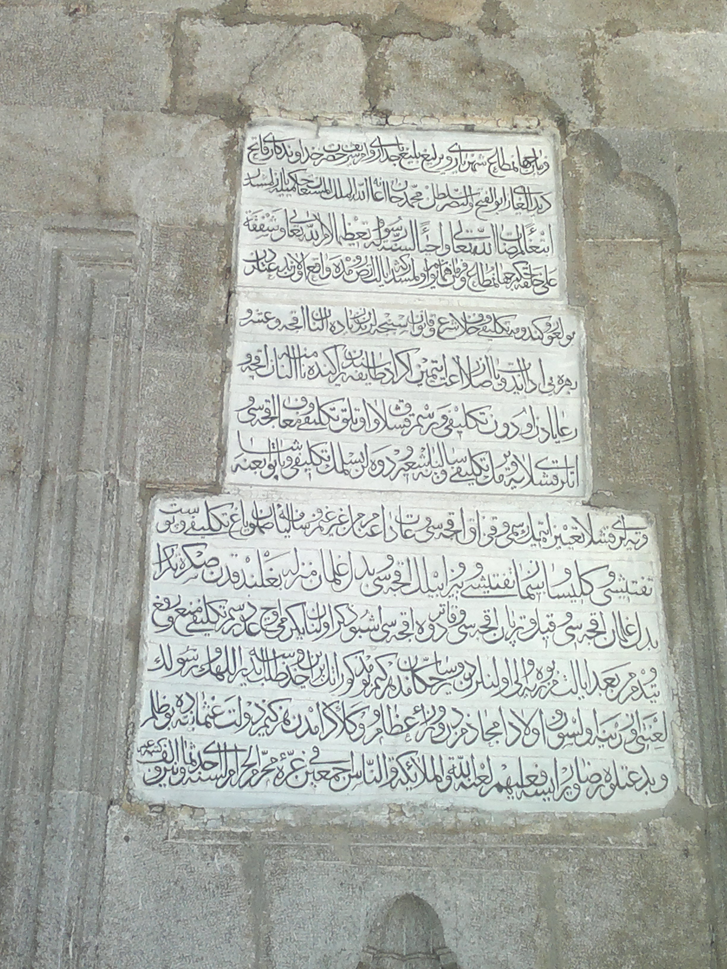 Erzurum Lala Mustafa Paşa Camii (Türkiye'de Erzurum İli merkez ilçesi Yakutiye'de 1562 yılında Lala Mustafa Paşa tarafından yaptırılmış Erzurum ’daki ilk Osmanlı camisidir) Son Cemaat yerindeki 1671 yılında IV Avcı Mehmet döneminde konulmuş Ferman.